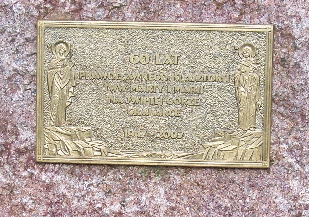 Tablica upamiętniająca 60 rocznicę powołania klasztoru na górze Grabarce.